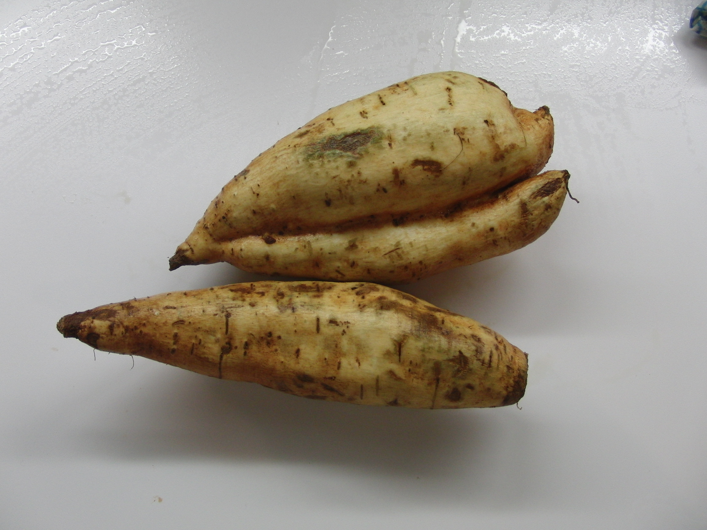 Süsskartoffel, Batate (Ipomoea batatas) mit weißem Fruchtfleisch 15 und 17 cm lang